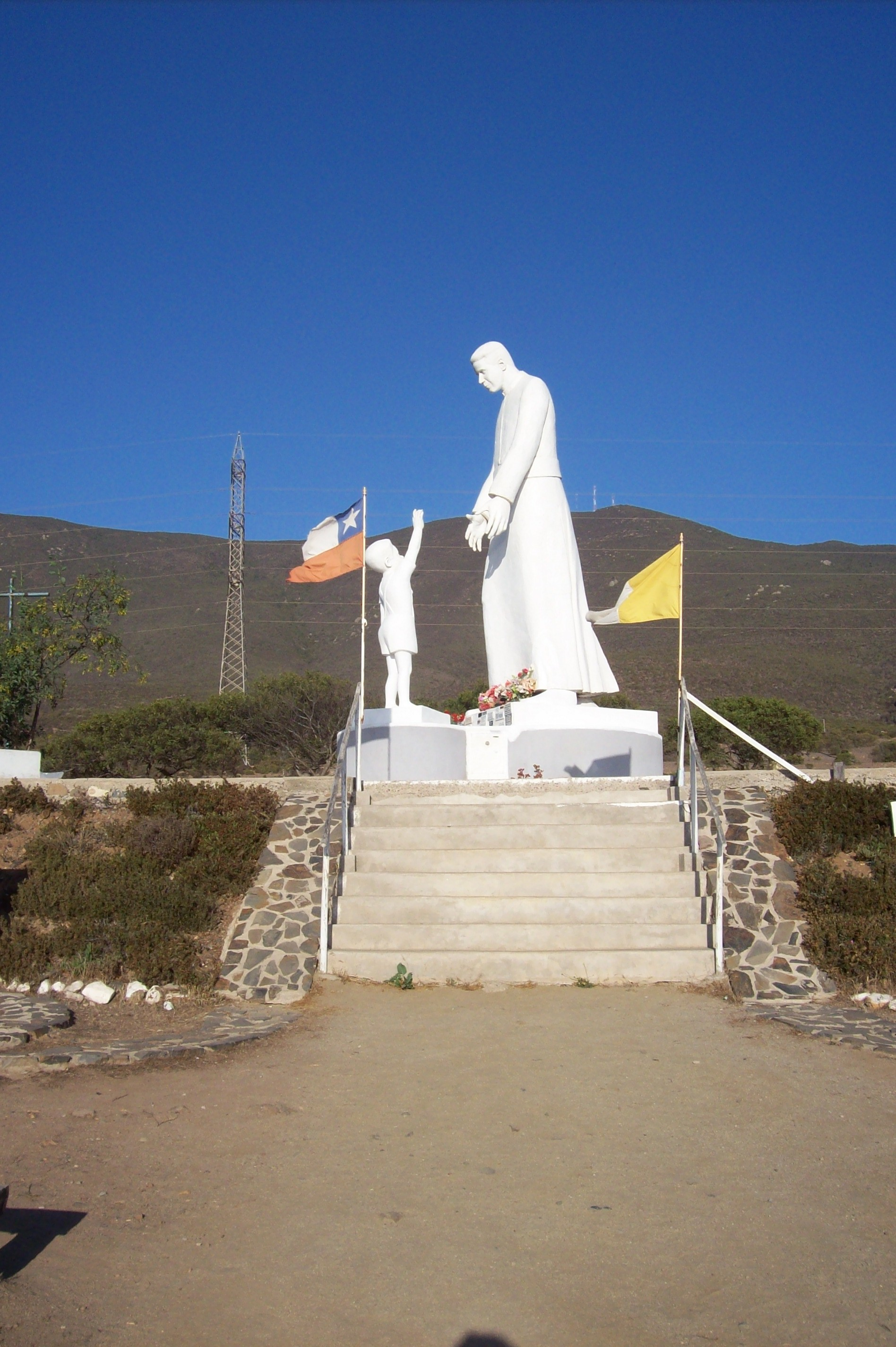 Santuario Padre Alberto Hurtado